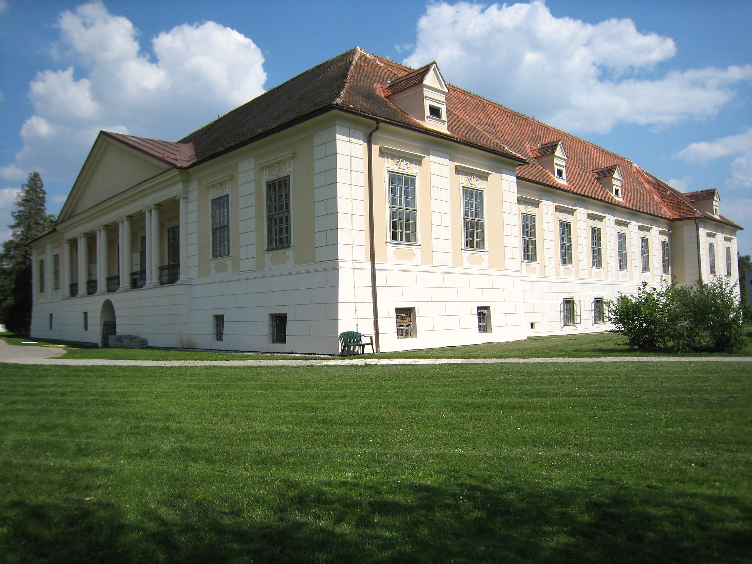 Gartenhaus des Schlosses Retzhof